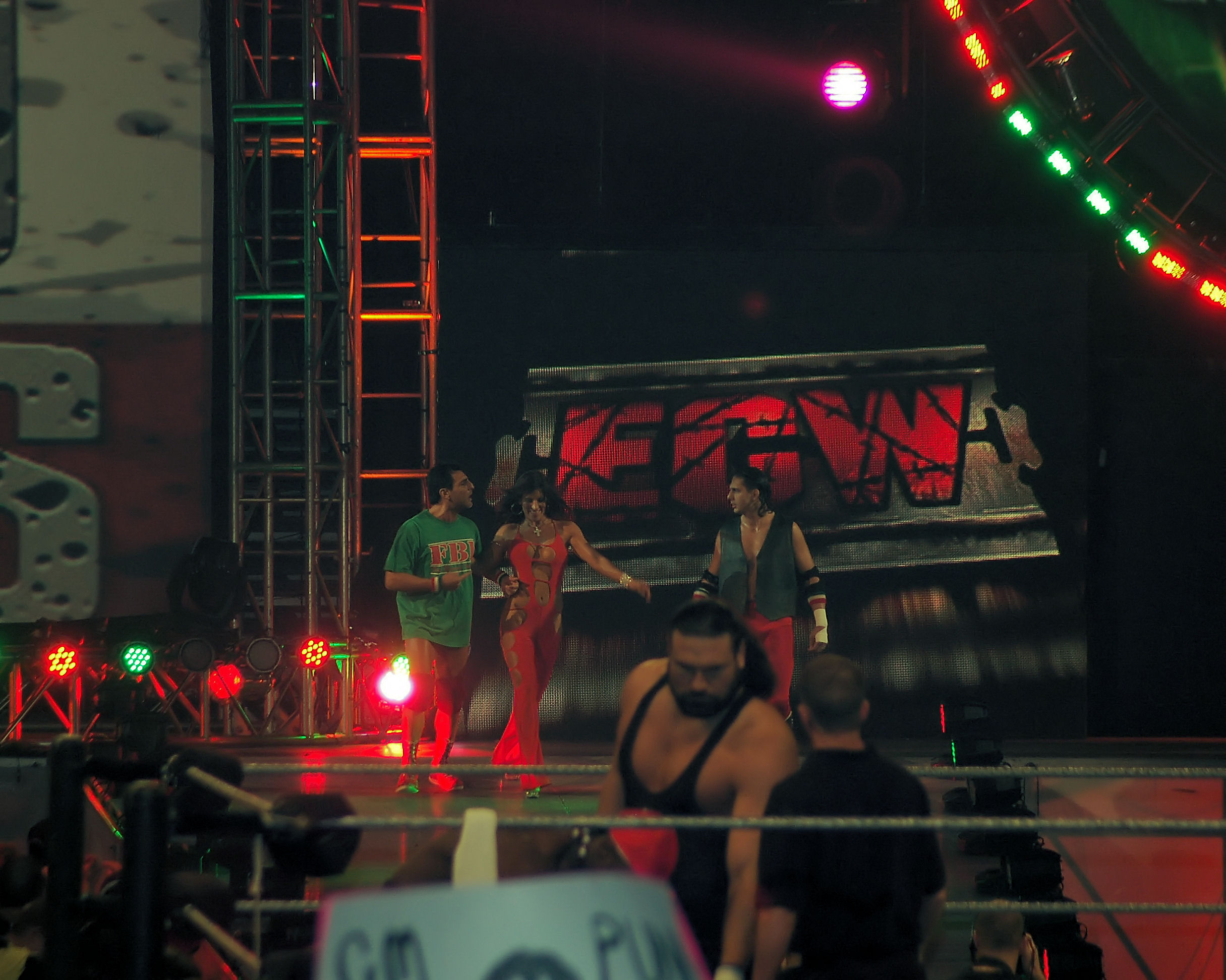 James Maritato et Tony Mamaluke à la ECW en 2005. Template:James Maritato and Tony Mamaluke making their way to the ring in ECW in 2005. Between them is Trinity (Stephanie Finochio)